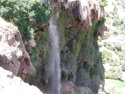 Licence: autorisation accordée par: Auteur et droits sur cette photo :Copyright © photo:chute sellah